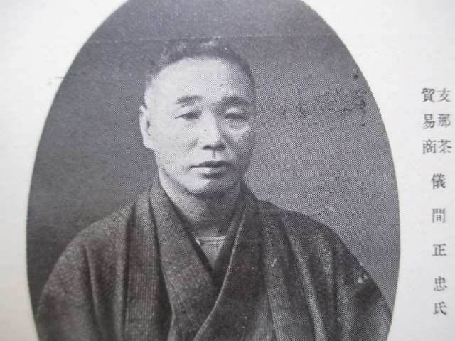 儀間正忠（唐名・胡国善、号は月亭）の顔写真。